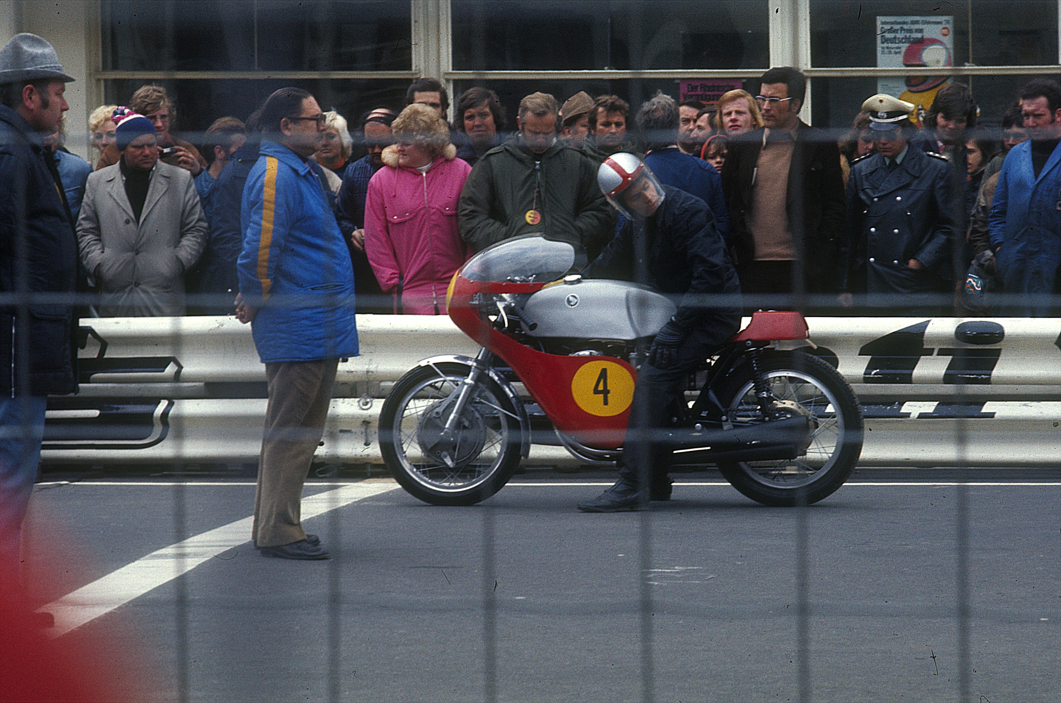 Börje Andersson beim boykottierten Eifelrennen 1974